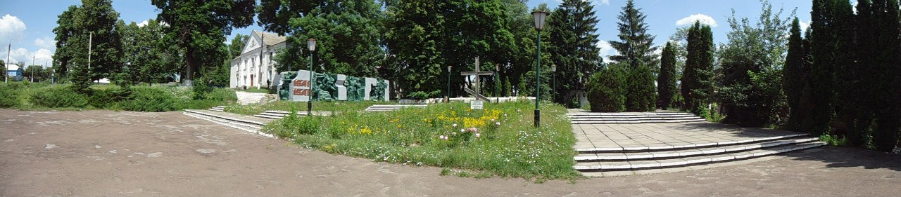 Панорама Понорниця